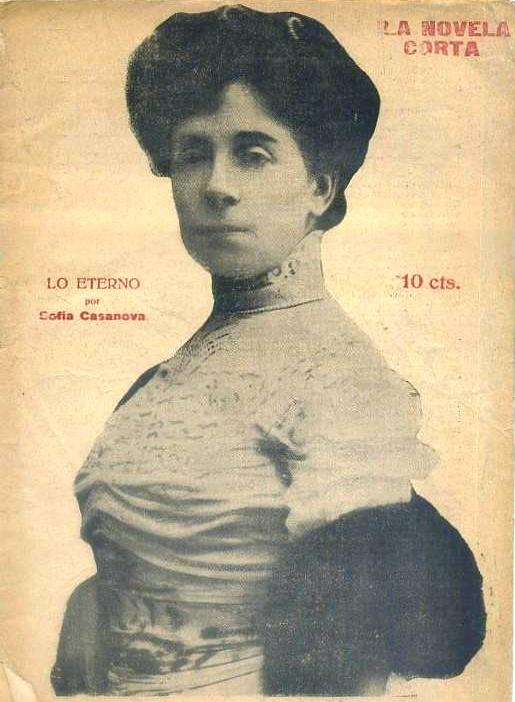 Lo eterno. Sofía Casanova. 1ª edición.